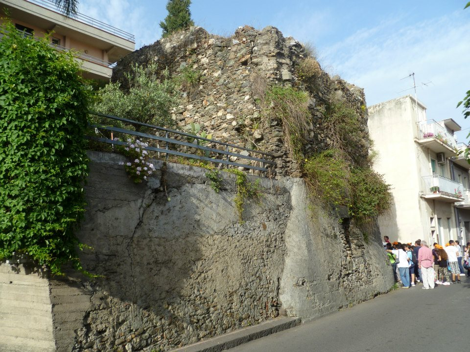 Torre del Baglio XV secolo